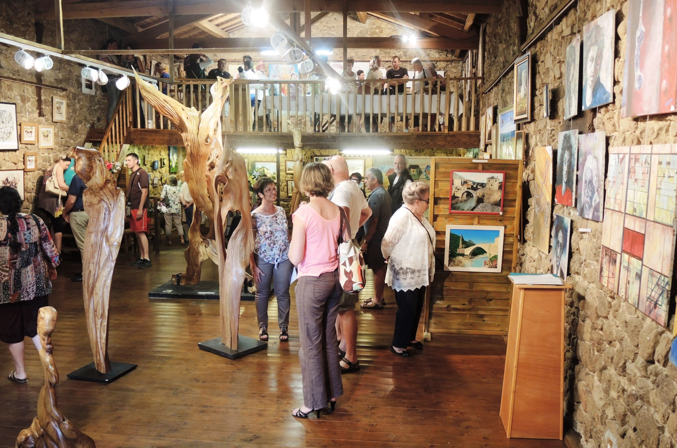 Préaux expo Riff'Arts